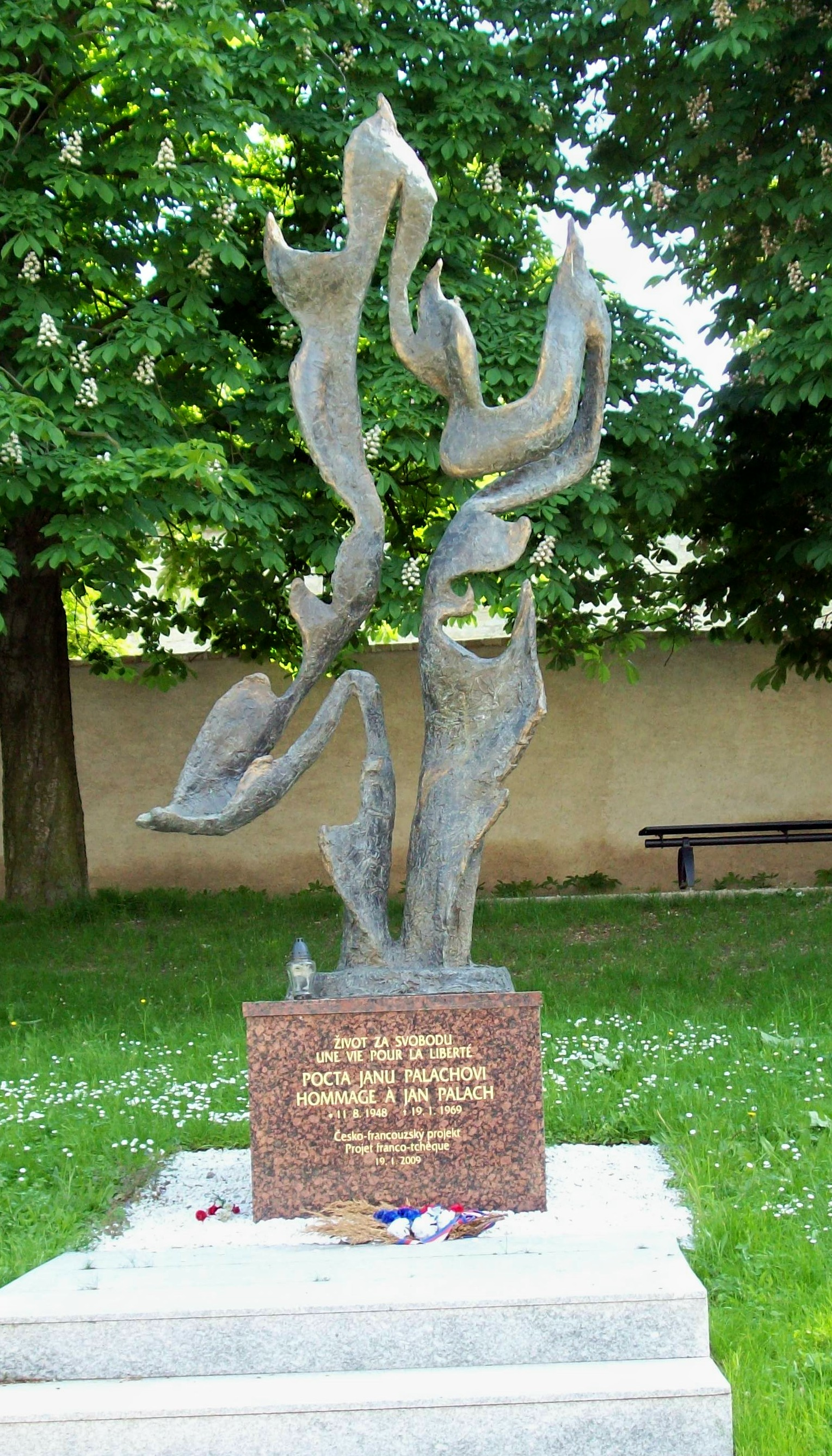 Bronzový památník Jana Palacha v Mělníku v Jungmannových sadech naproti bývalému gymnáziu, kde J. Palach maturoval roku 1966. Zobrazuje postavu v plamenech, autorem je francouzský umělecký slévač, který památník vytvořil podle původního díla maďarského sochaře Andráše Becka. Odhalen 19. ledna 2009 prezidentem republiky Václavem Klausem.